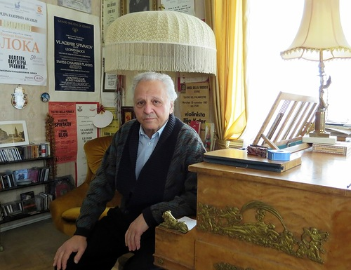 Фотография Л.К.Блока